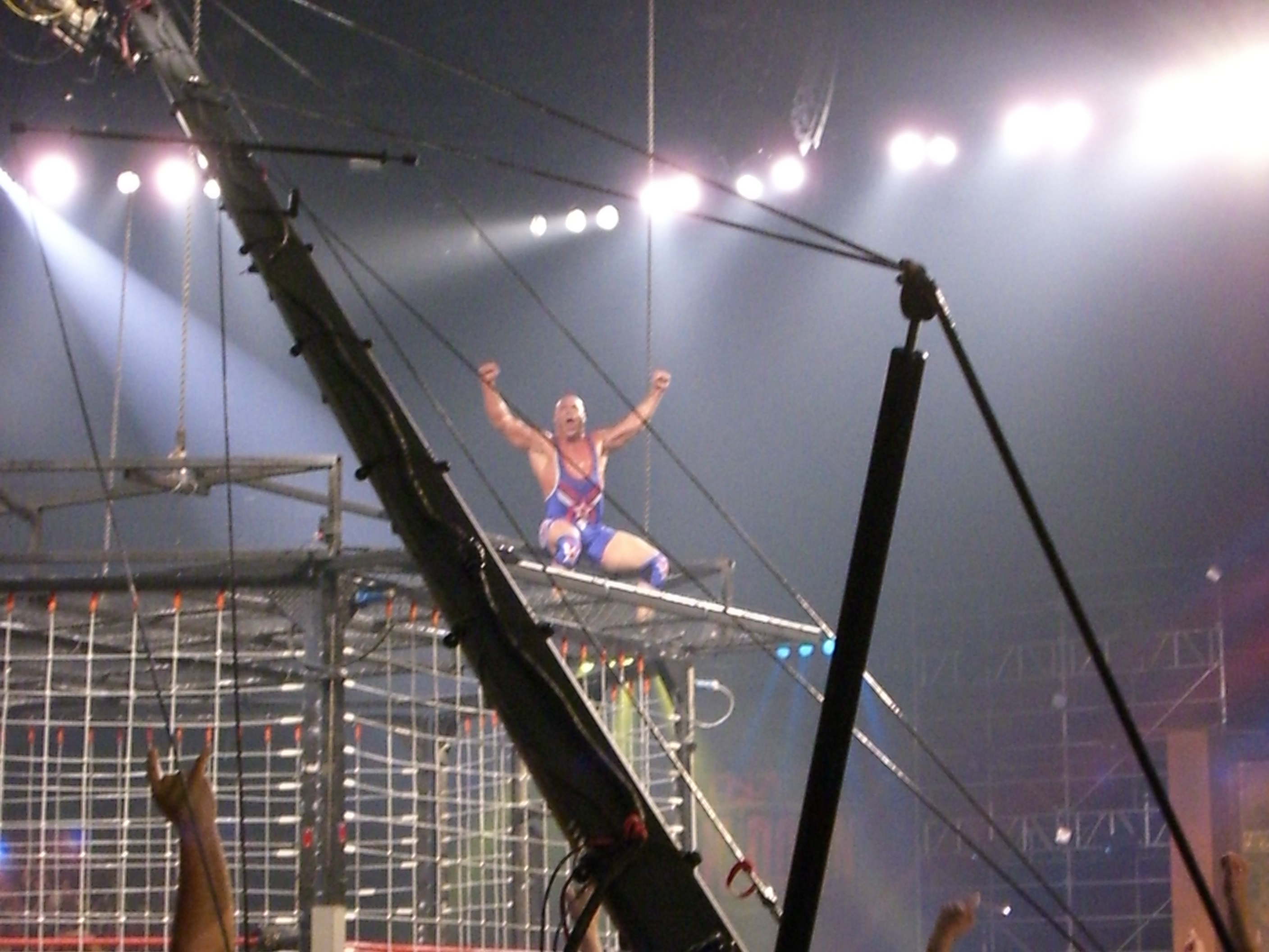 Kurt Angle célébrant la victoire de son équipe au cours de Lockdown 2007.